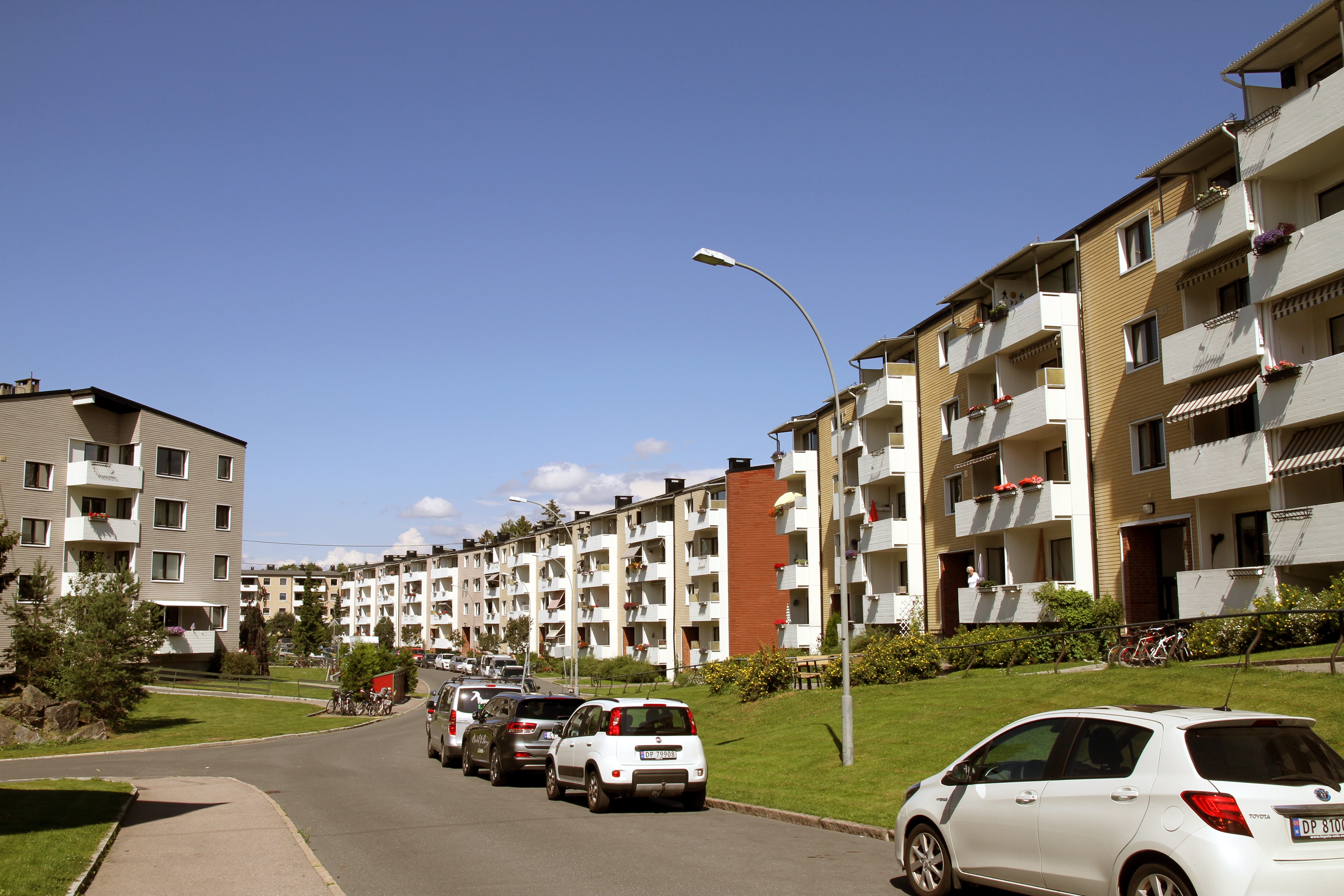 Grusveien i Oslo.